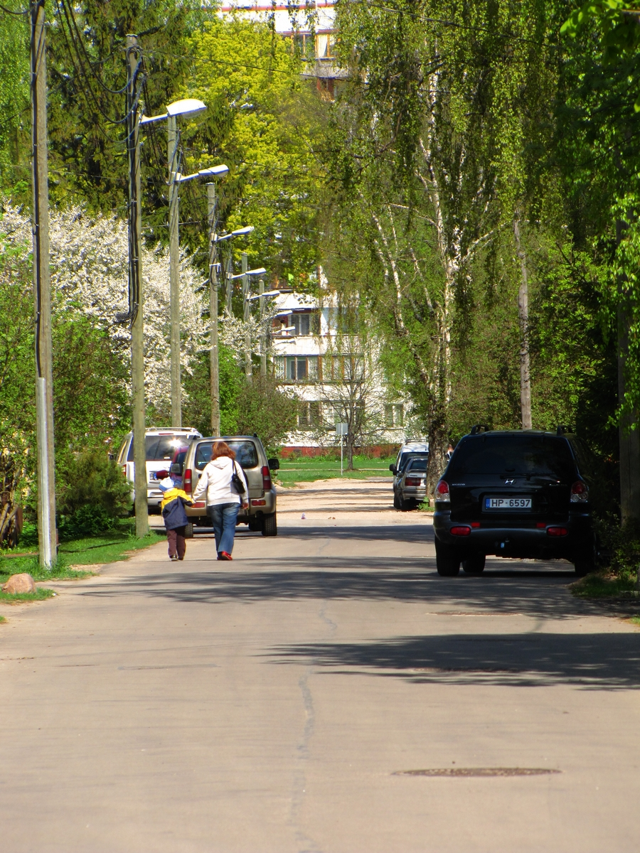 preilu iela